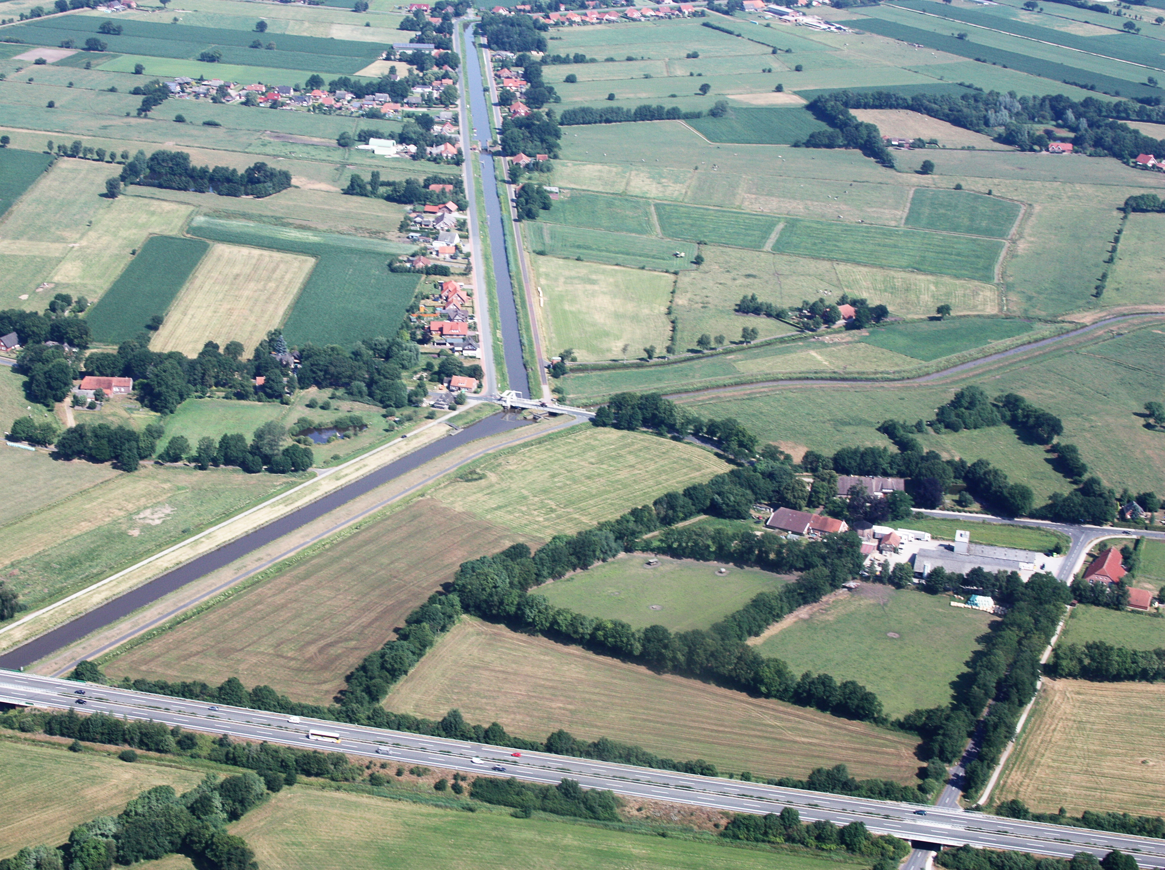 Luftaufnahme; Flug von Westerstede nach Leer; Flughöhe 1500 ft; Juli 2010; Originalfoto bearbeitet: Tonwertkorrektur und Bild geschärft mit Hochpassfilter